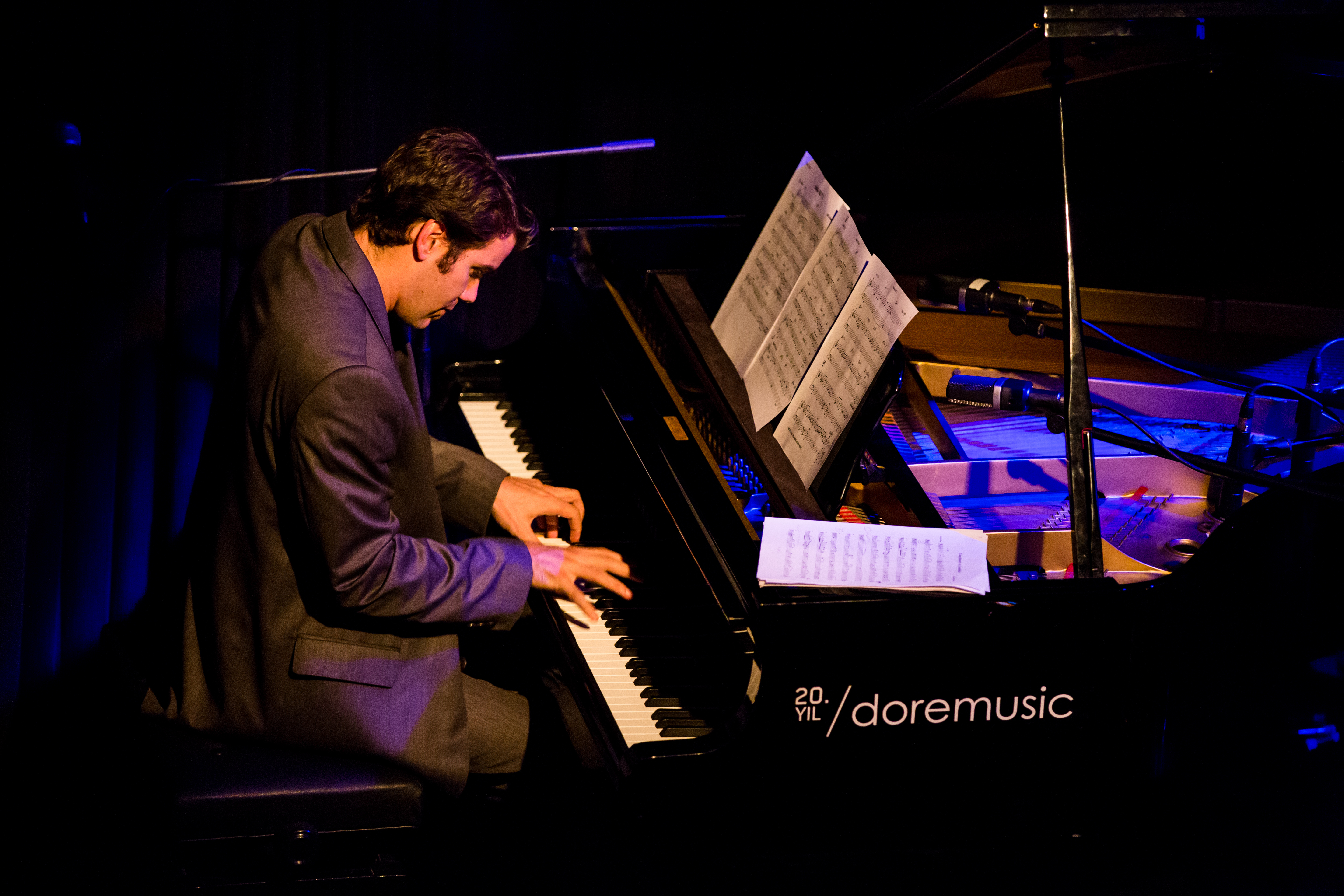 Caz müzisyeni